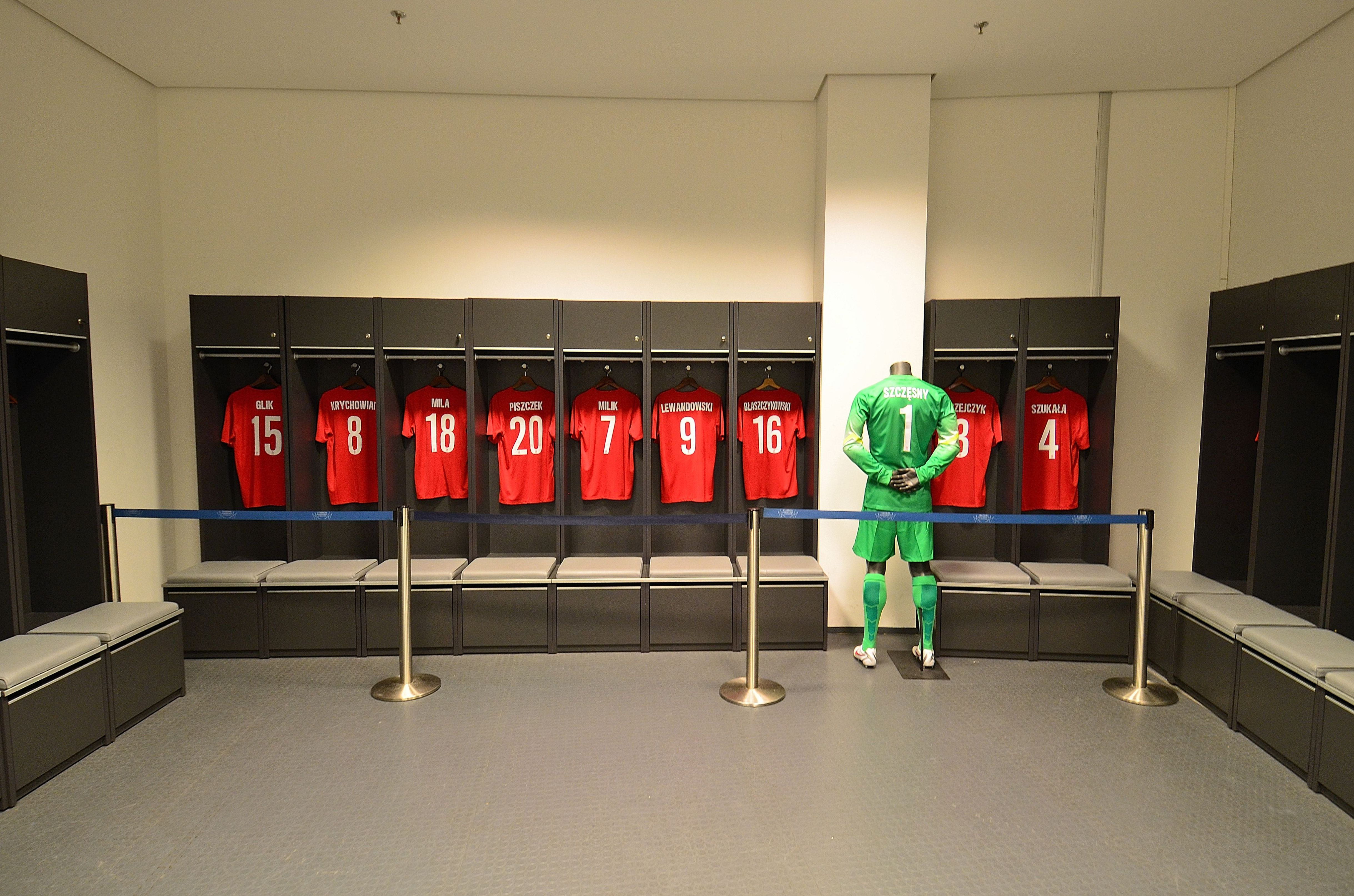 Szatnia dla zawodników na Stadionie Narodowym w Warszawie